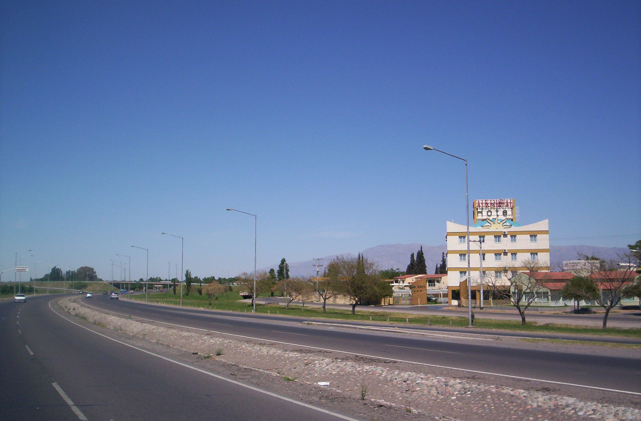 Vista de la Ruta Nacional A014 o autopista de Circunvalación, tramo perteneciente al departamento Santa Lucía provincia de San Juan Argentina